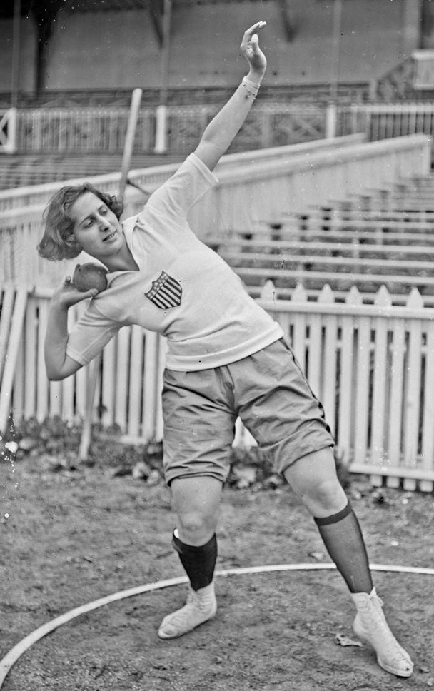 [10-8-22, Colombes,] miss Maud Rosenbaum, [lancer du] poids : [photographie de presse] / [Agence Rol]